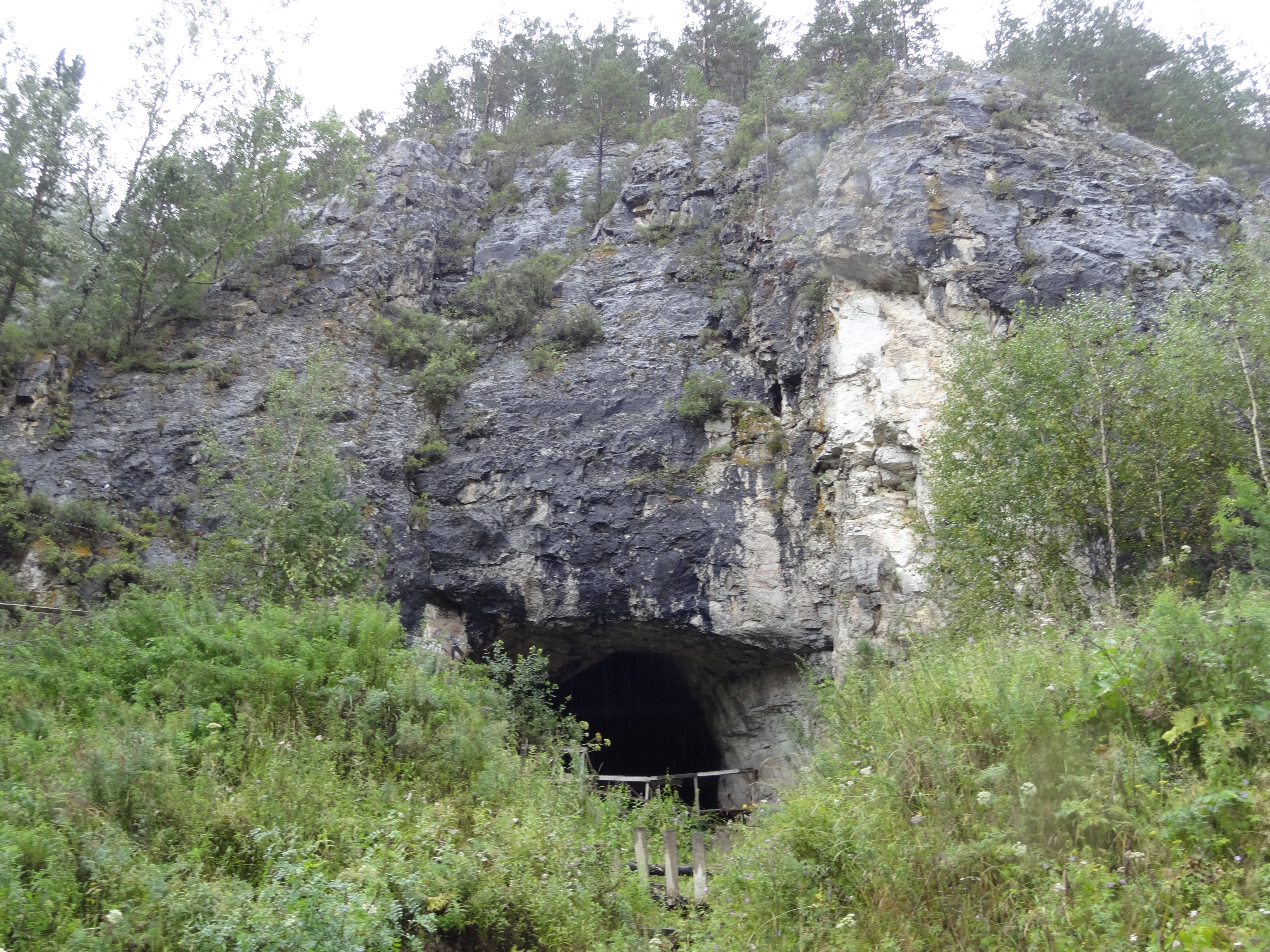 Денисова пещера: Солонешенский район, Алтайский край This image is related to the protected area of Russia number 2210161